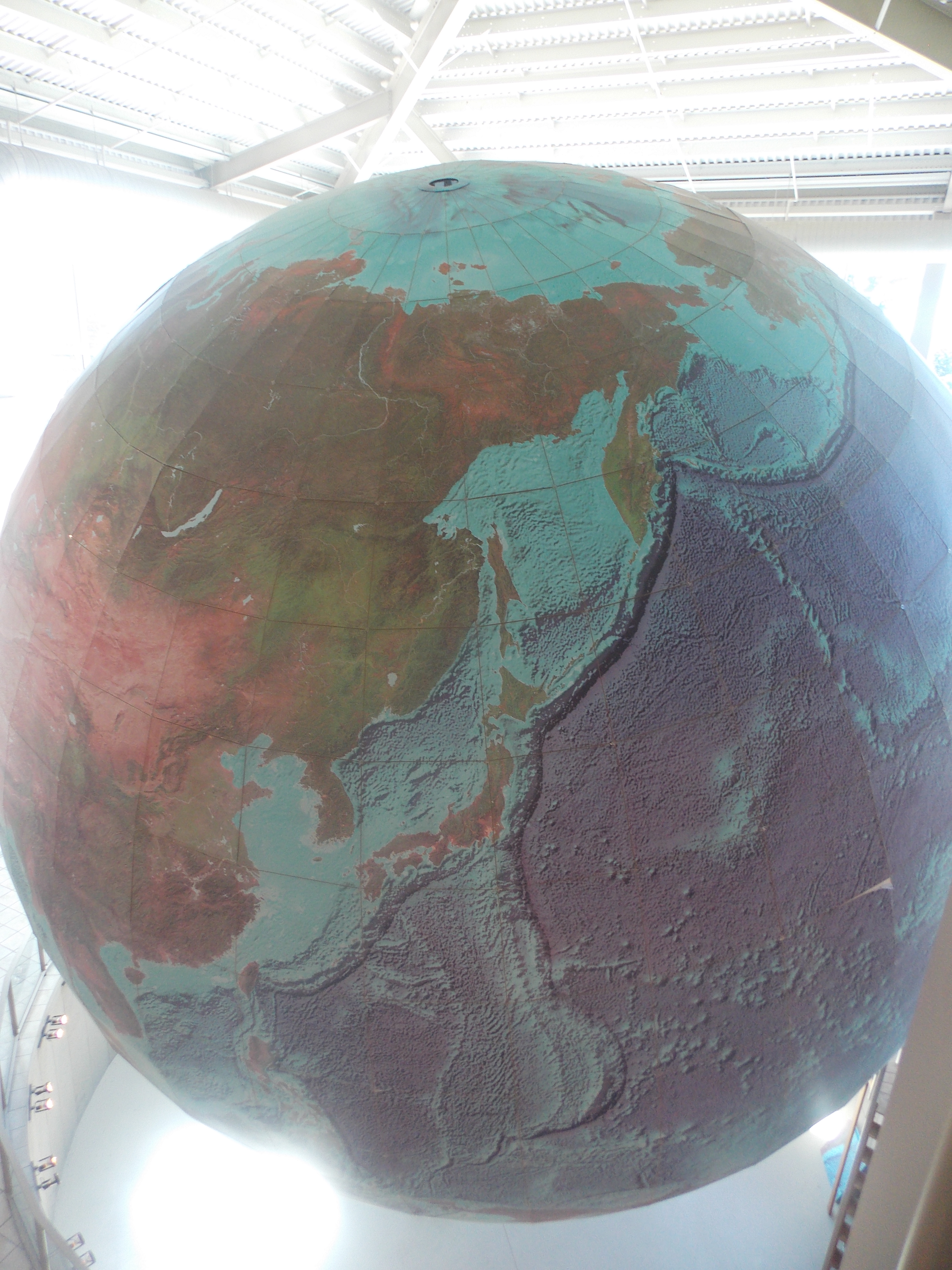 Աշխարհի ամենամեծ պտտվող գլոբուսը